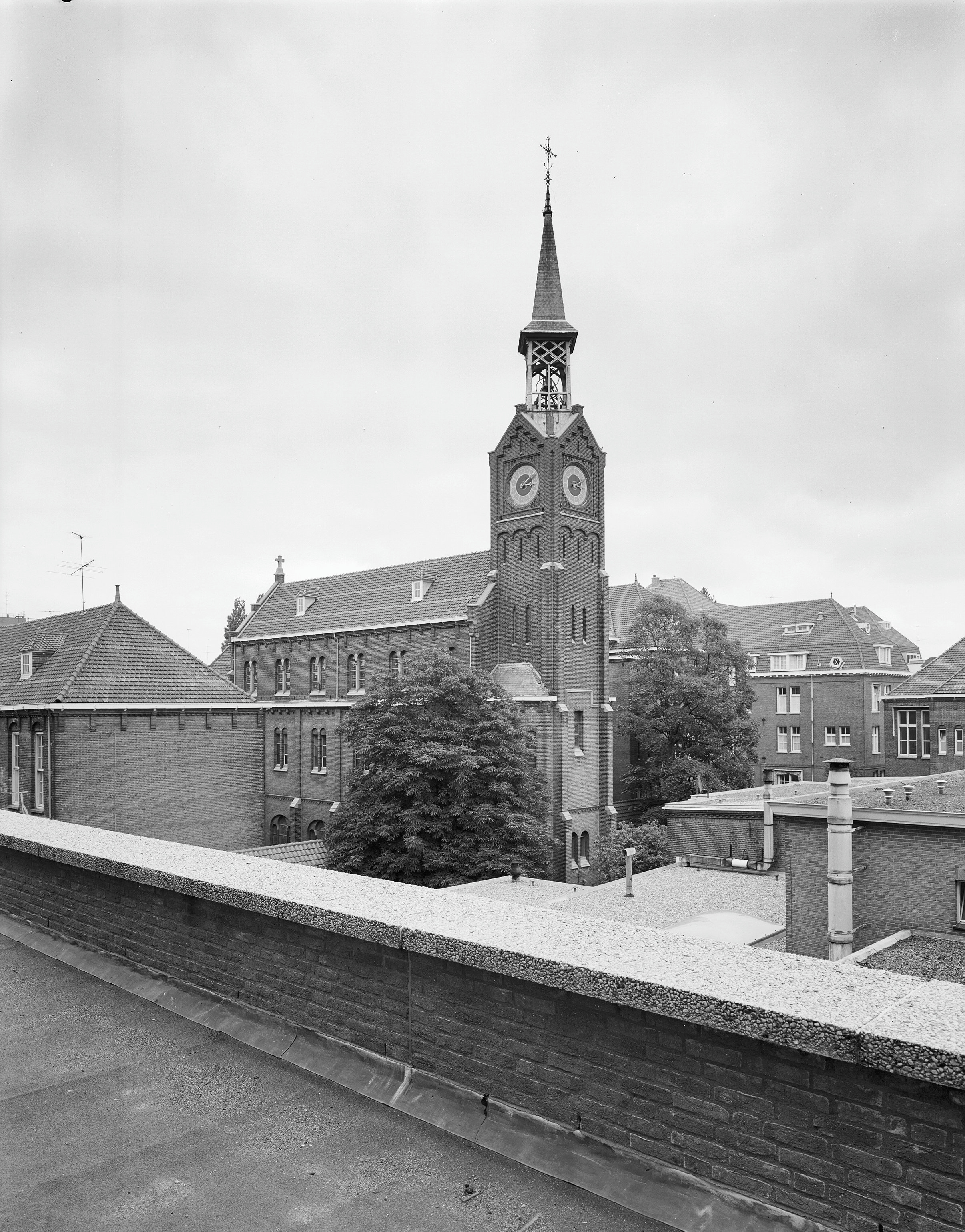 O.L.Vr. Gasthuis: exterieur kapel